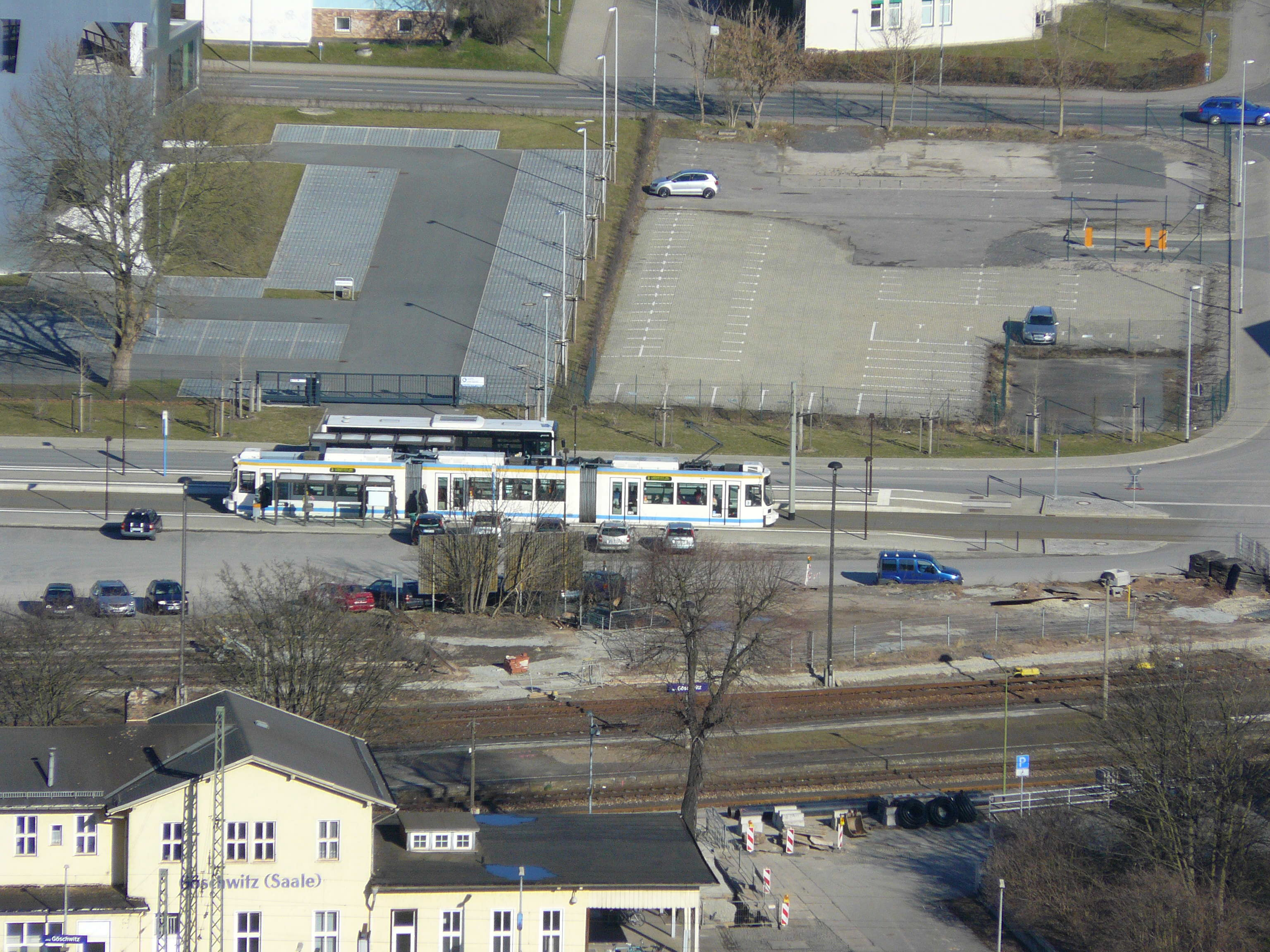 Straßenbahnhaltestelle in Jena am Bahnhof Jena-Göschwitz, Triebwagen hält kurz vor der Weiterfahrt nach Jena-Lobeda-West. Aufnahme aus ca. 100 Metern Höhe vom Mönchsberg am Rand des ehemaligen Steinbruchs des Zementwerkes und späteren Schießplatzes in östlicher Richtung.